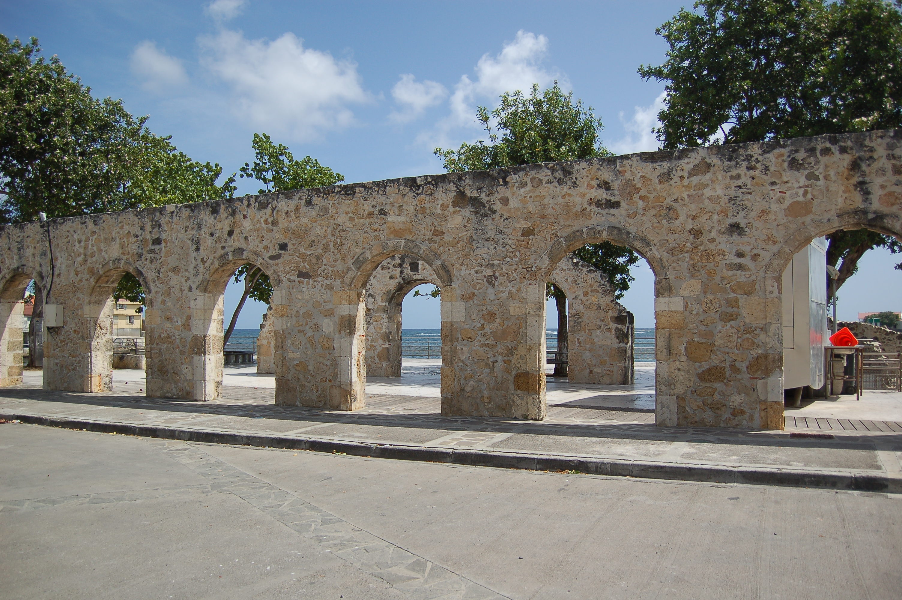 Ancienne fabrique de limonade, Le Moule, Guadeloupe